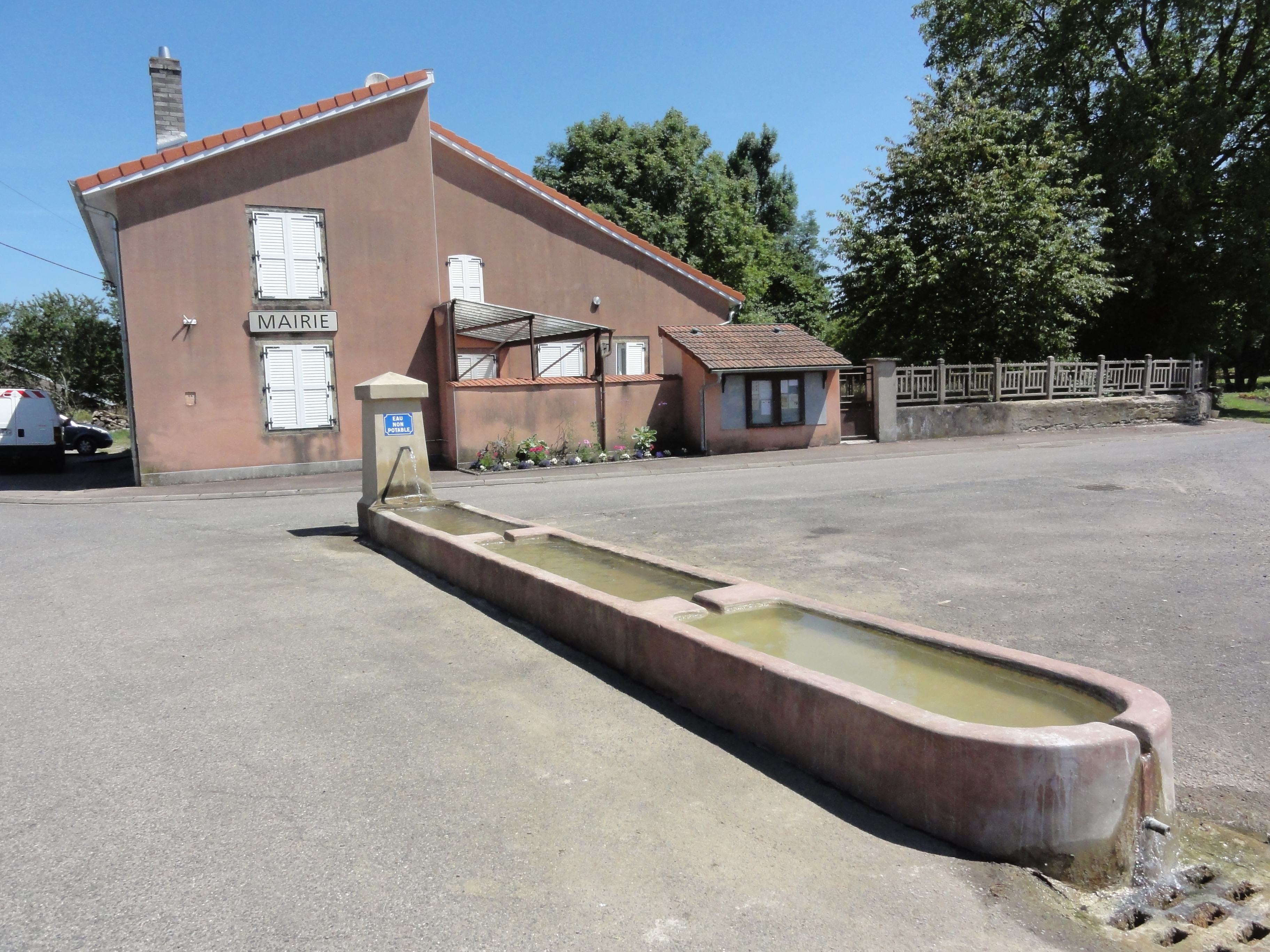 Buriville (M-et-M) mairie et fontaine